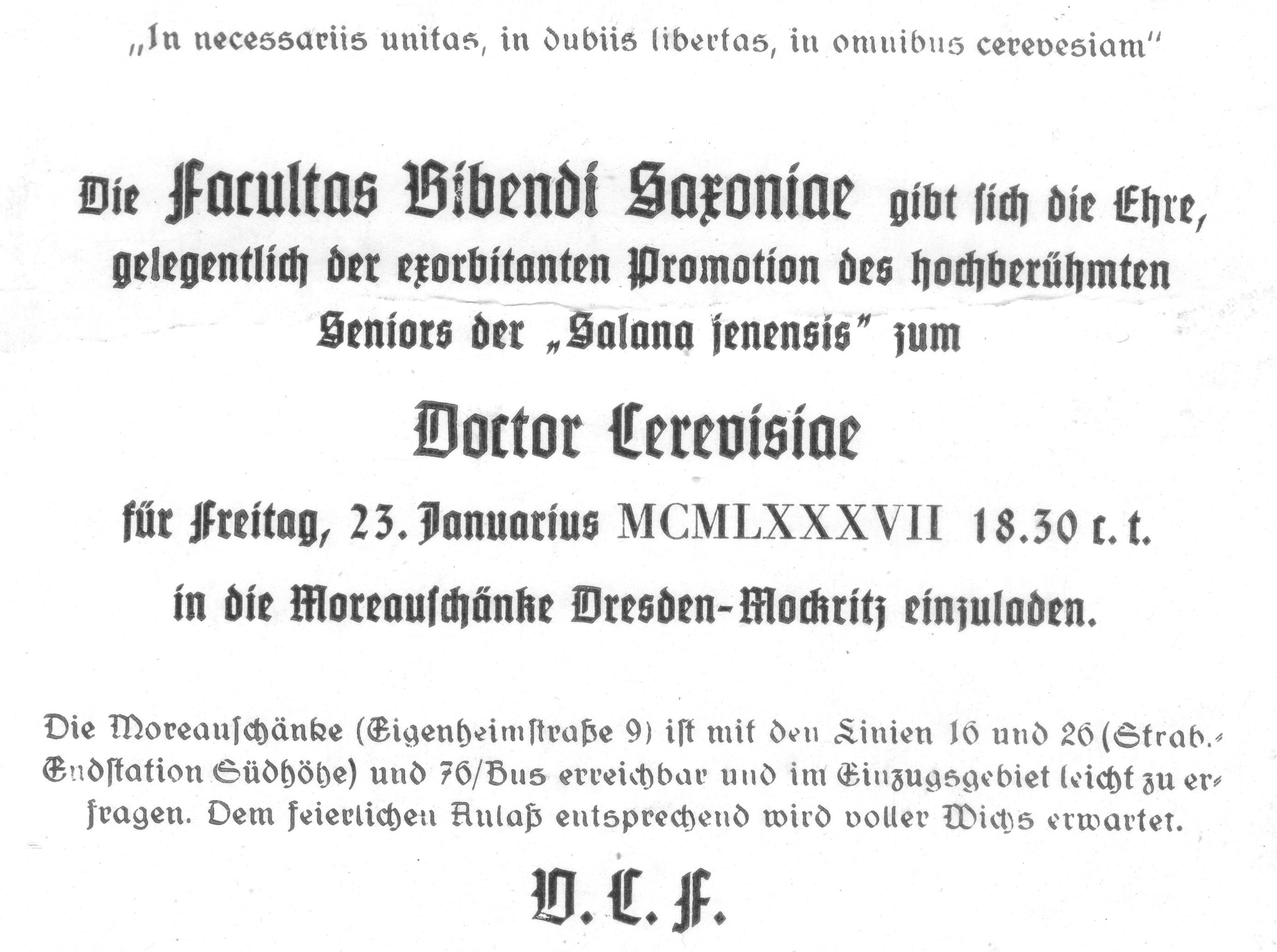 Einladung zur Bierpromotion von Helmut Gabel